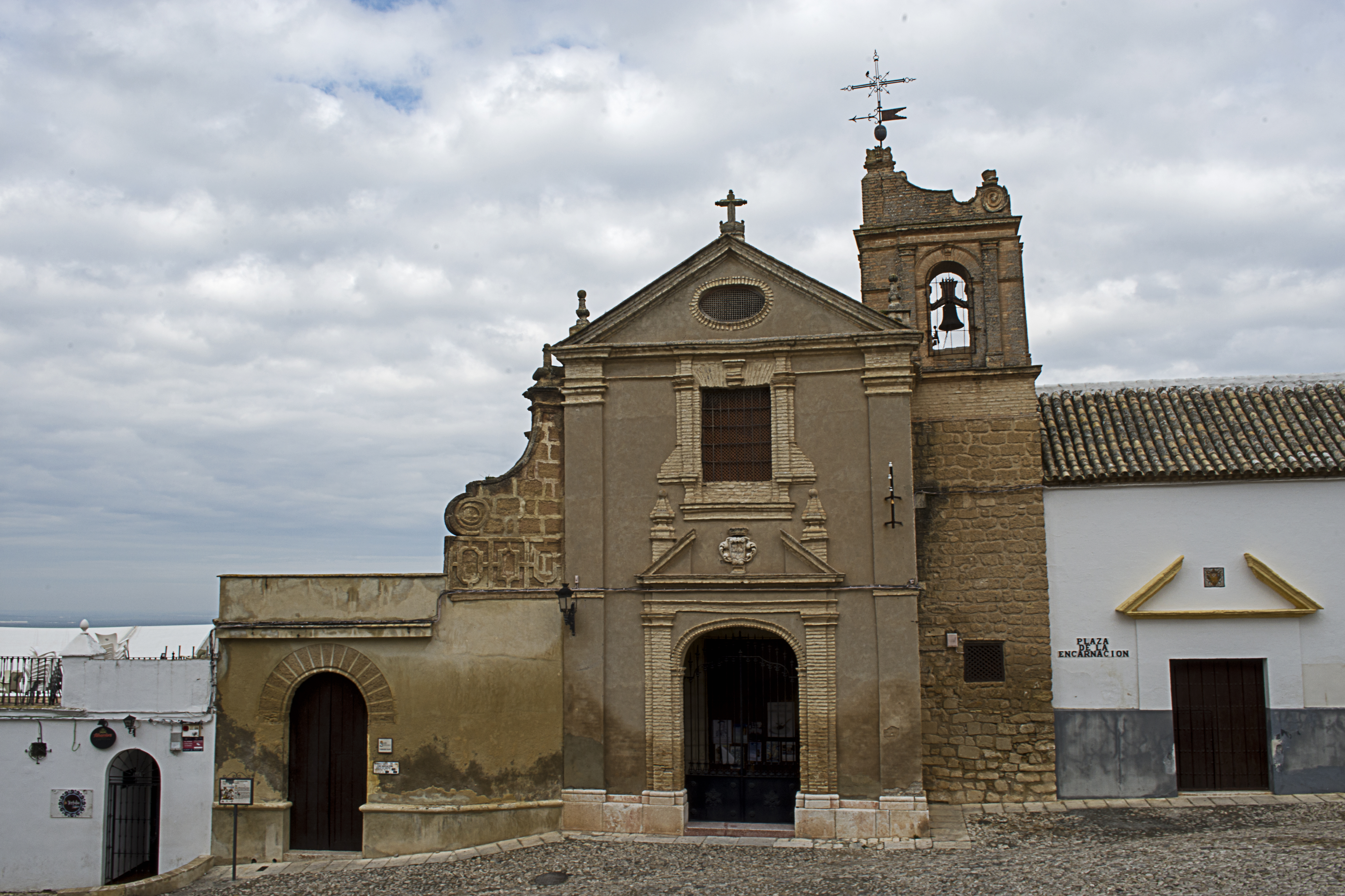 Convento de la Encarnación en Osuna (provincia de Sevilla).